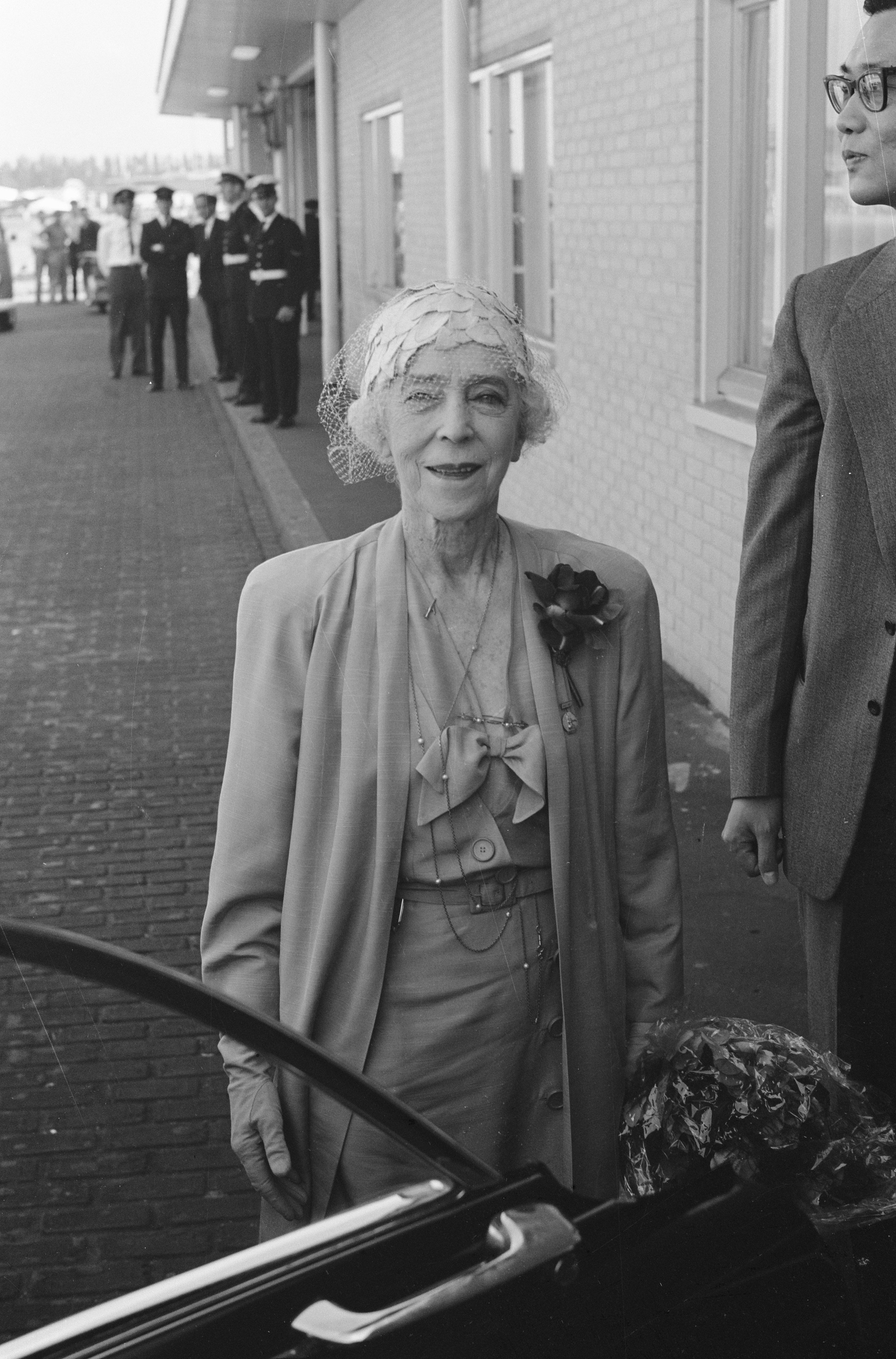 Collectie / Archief : Fotocollectie Anefo Reportage / Serie : [ onbekend ] Beschrijving : Kon. moeder Elisabeth van Belgie vertrekt naar Peking Datum : 21 september 1961 Locatie : Peking Persoonsnaam : Elisabeth van Belgie Fotograaf : Pot, Harry / Anefo Auteursrechthebbende : Nationaal Archief Materiaalsoort : Negatief (zwart/wit) Nummer archiefinventaris : bekijk toegang 2.24.01.05 Bestanddeelnummer : 912-9578